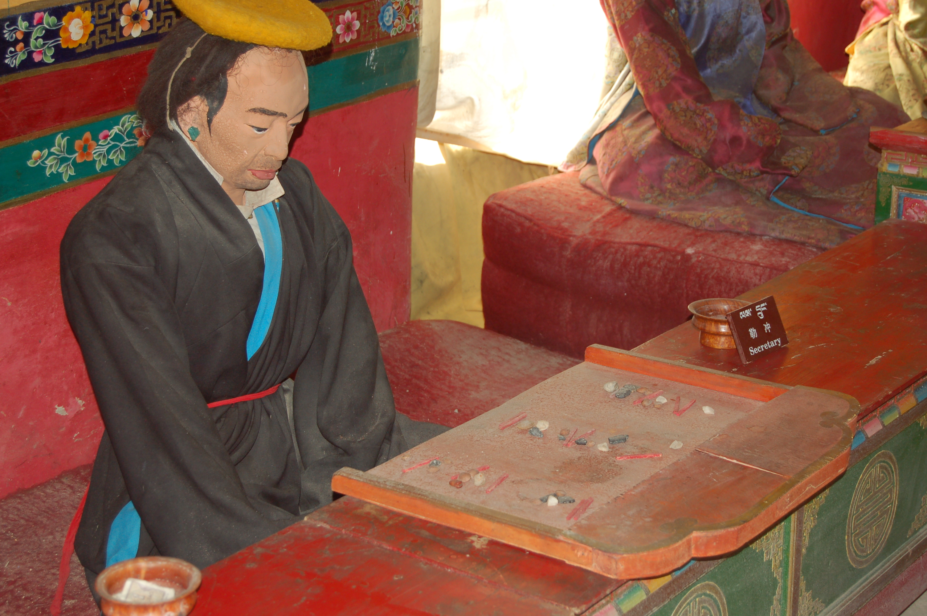 Dokumentation der Unterdrückung der tibetischen Bevölkerung durch den Adel, dargestellt im Museum der Burg von Gyangtse: Ein Beamter rechnet auf dem Abakus mit losen Steinen.